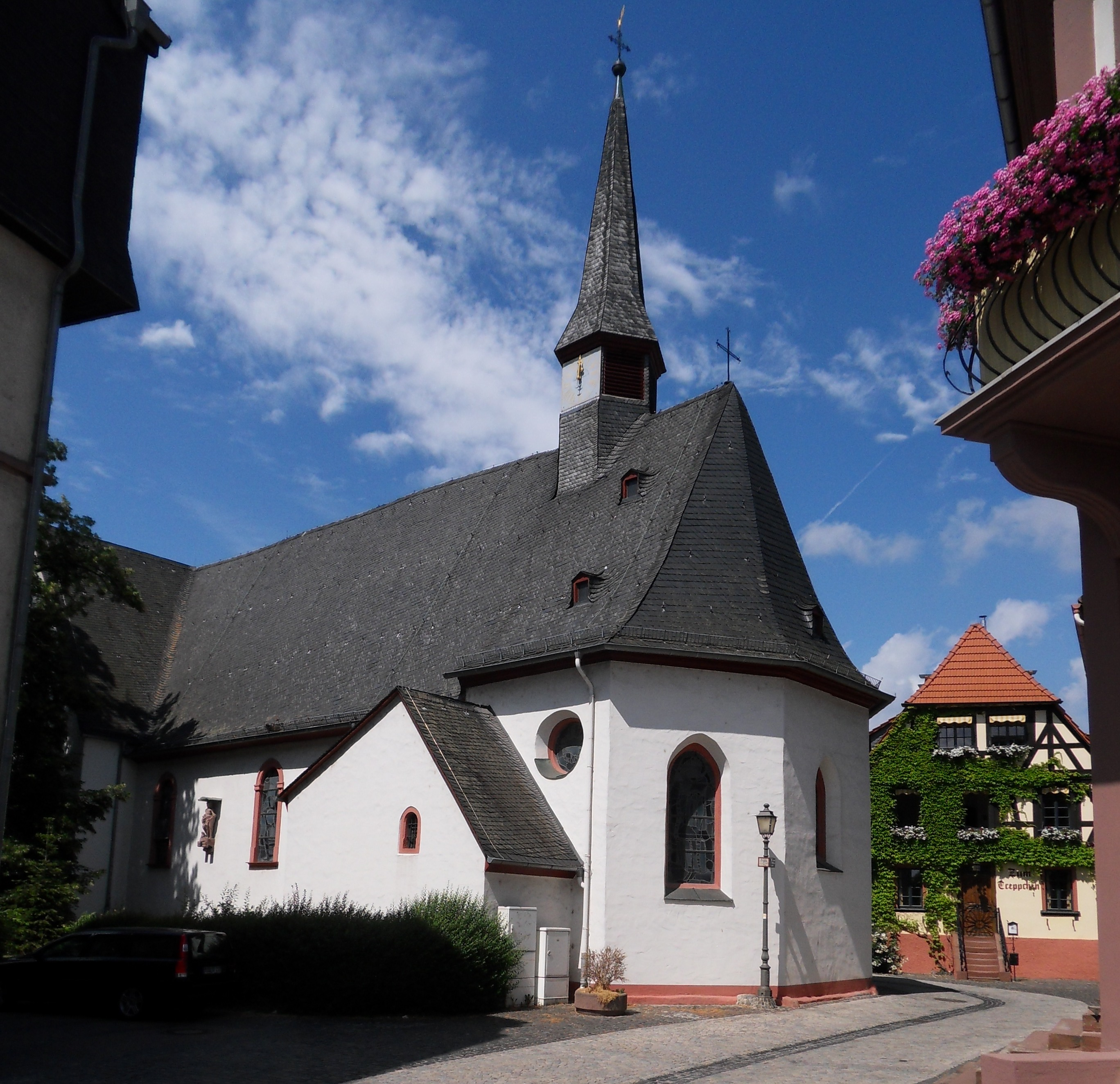 Katholische Pfarrkirche St. Johannes der Täufer in Niederwalluf in der Kirchgasse